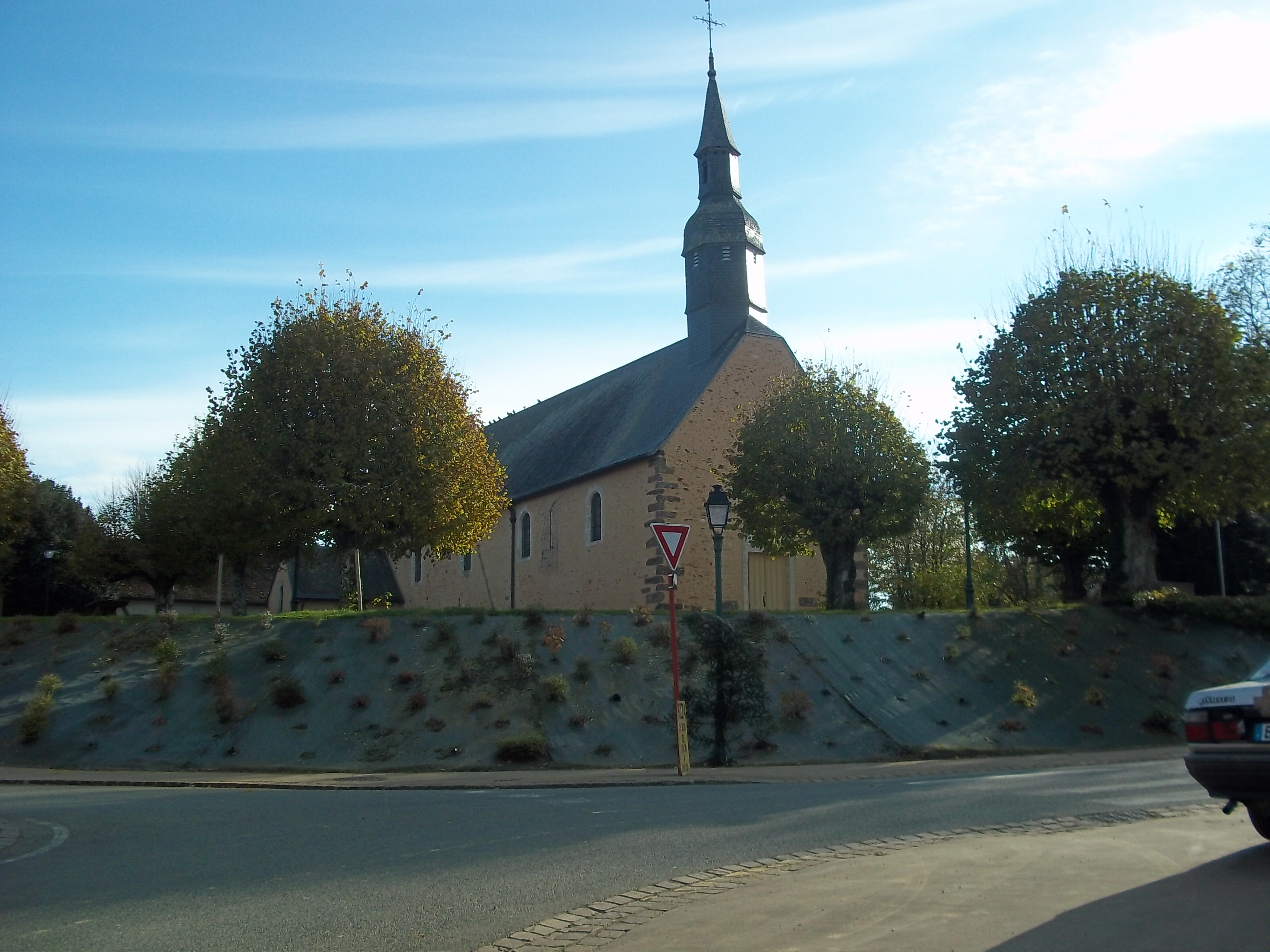 L'église